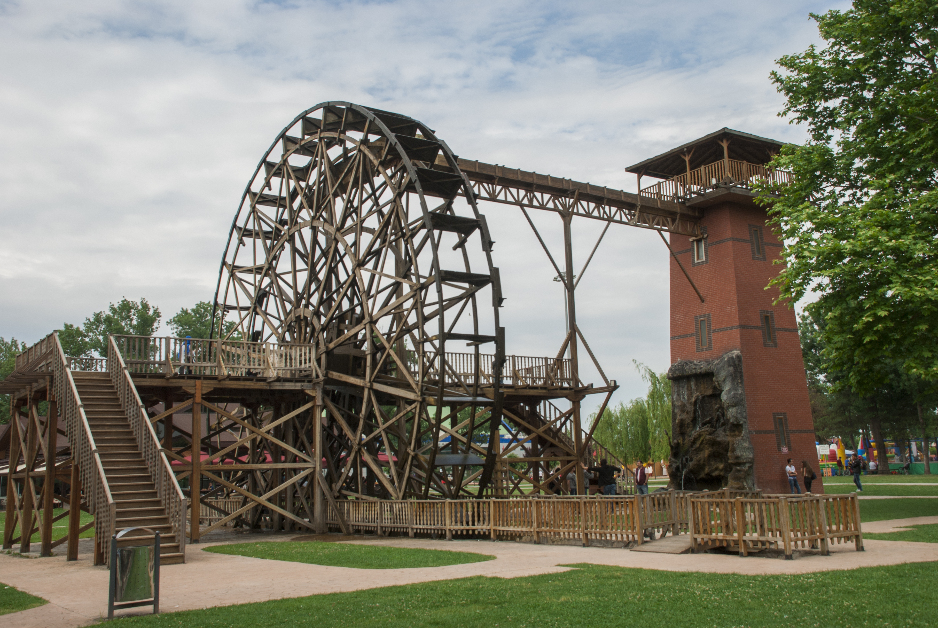 Aslı 1894 yılında yaptırılan Tarihi Çark'ın replikası.Sakarya Kent Park'ta, Çark Suyu'nun yanında kuruludur.